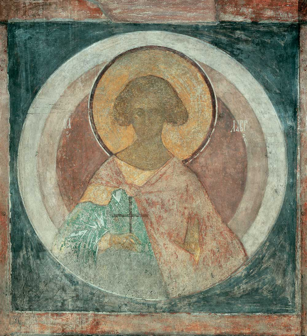 Фреска Успенского собора на Городке в Звенигороде. Около 1399 года.